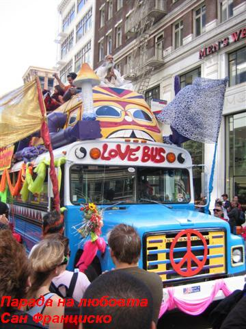 Парада на любовта провел се за 2-ри път в Сан Франциско 24.ІХ.2005, едно от превозните средства (Love Parade) (авторска снимка)